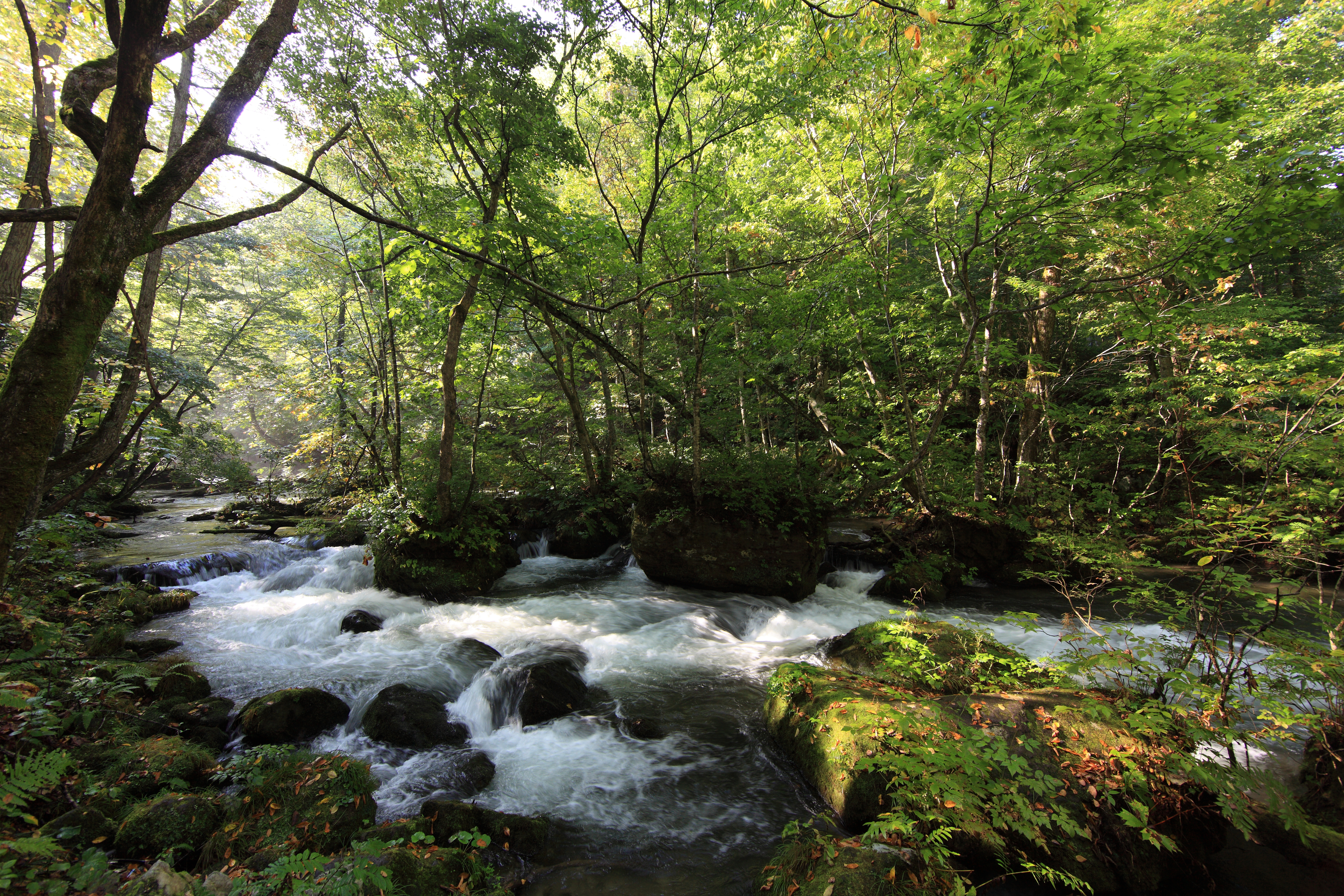 Oirase Stream, Towada-shi(city) Aomori-ken(Prefecture), Japan 青森県十和田市(あおもりけんとわだし) 奥入瀬渓流(おいらせけいりゅう)